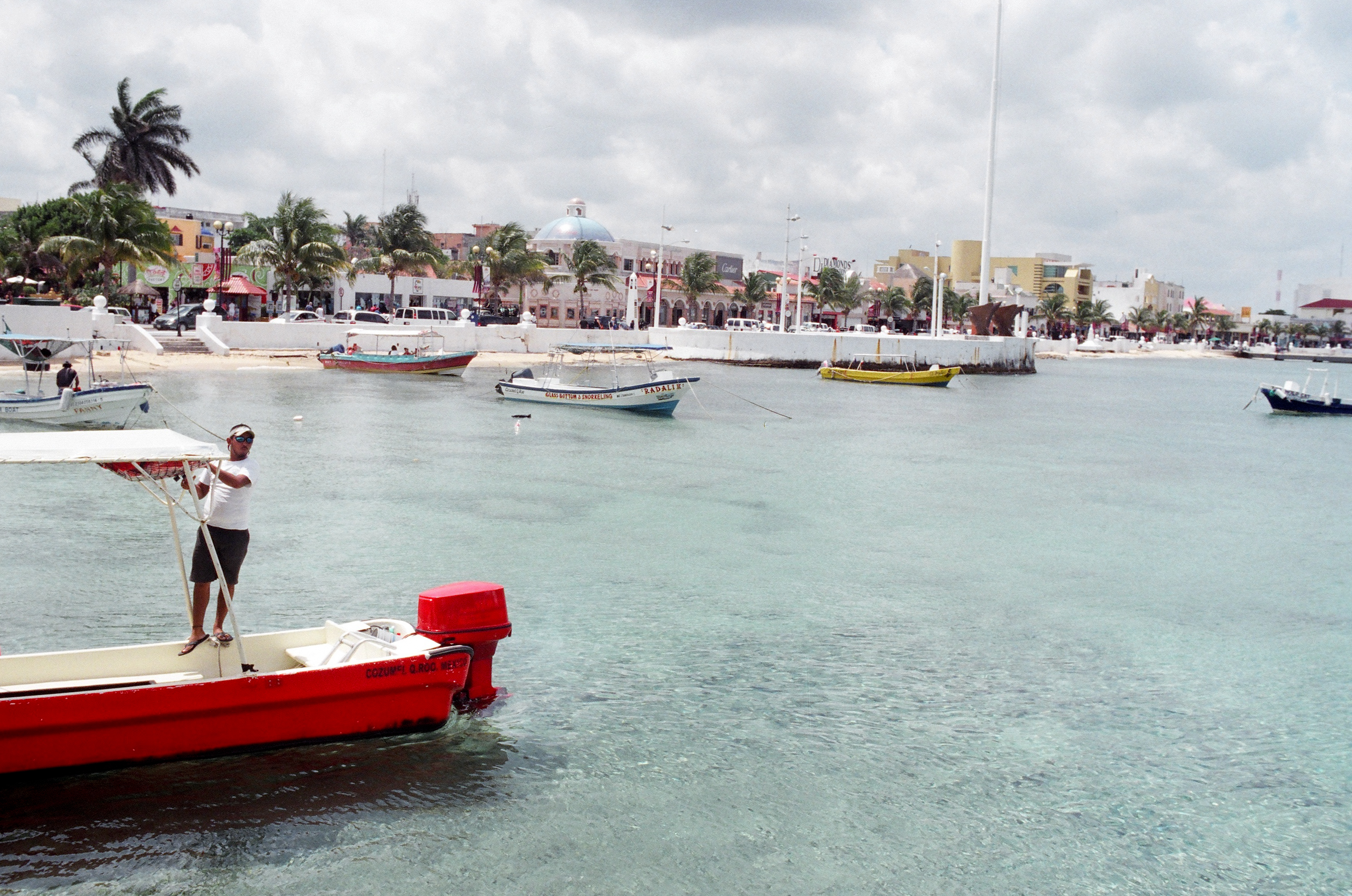 Nikon N80 / Fuji 400H / 35mm f/2 Lens